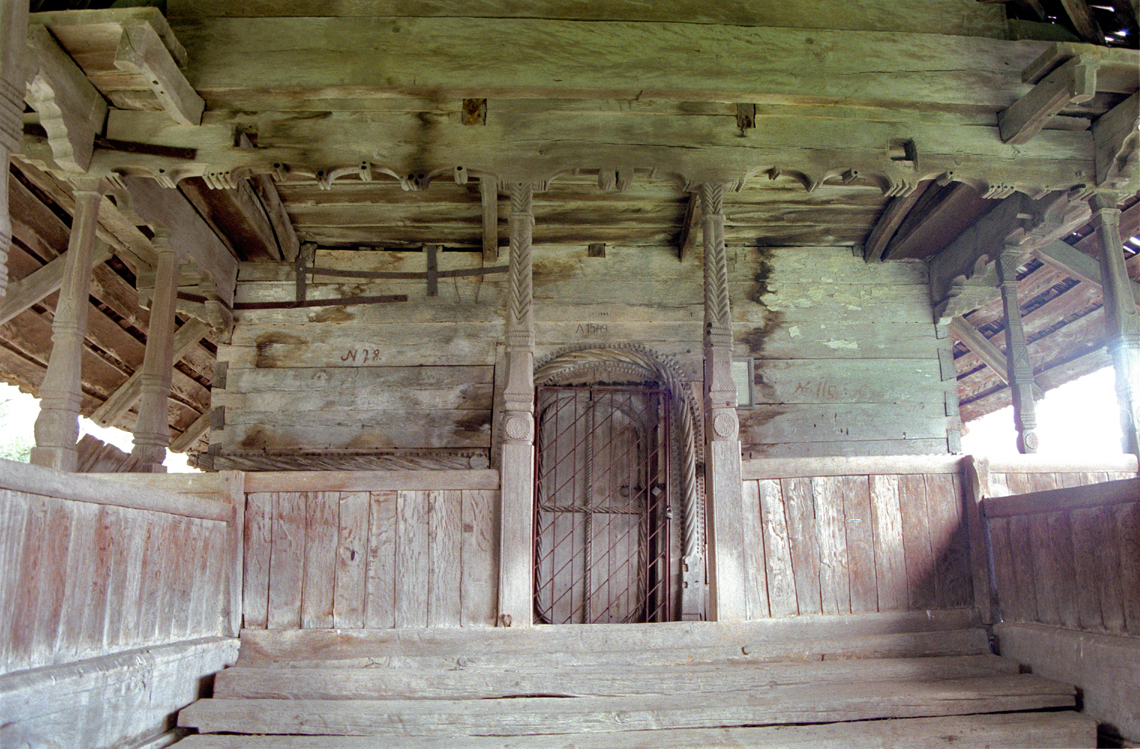 Comuna Leleasca, Olt, parohia Păroşi, biserica de lemn din fostul sat Ştefăneşti. Pridvorul.